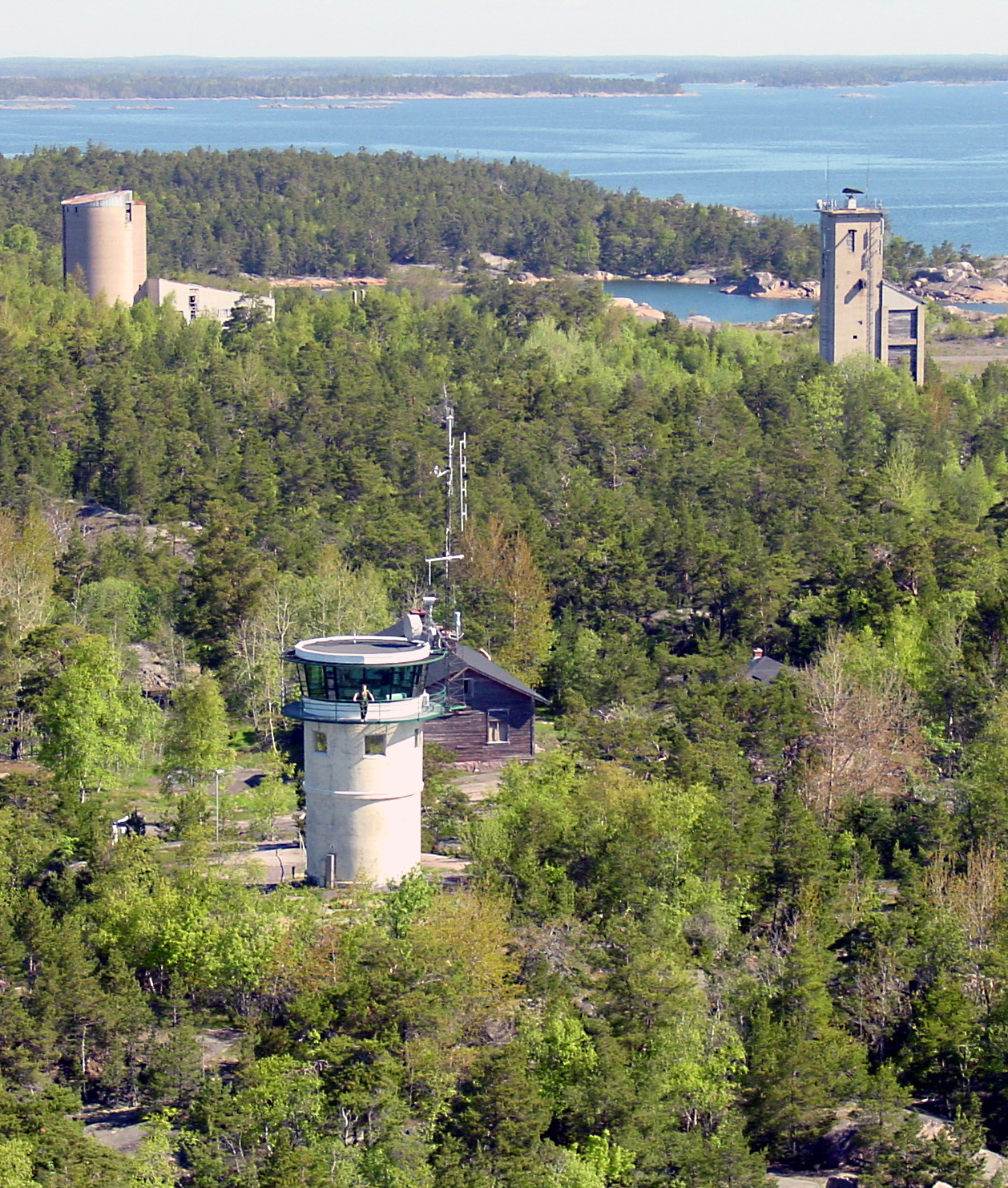 Jussarötower